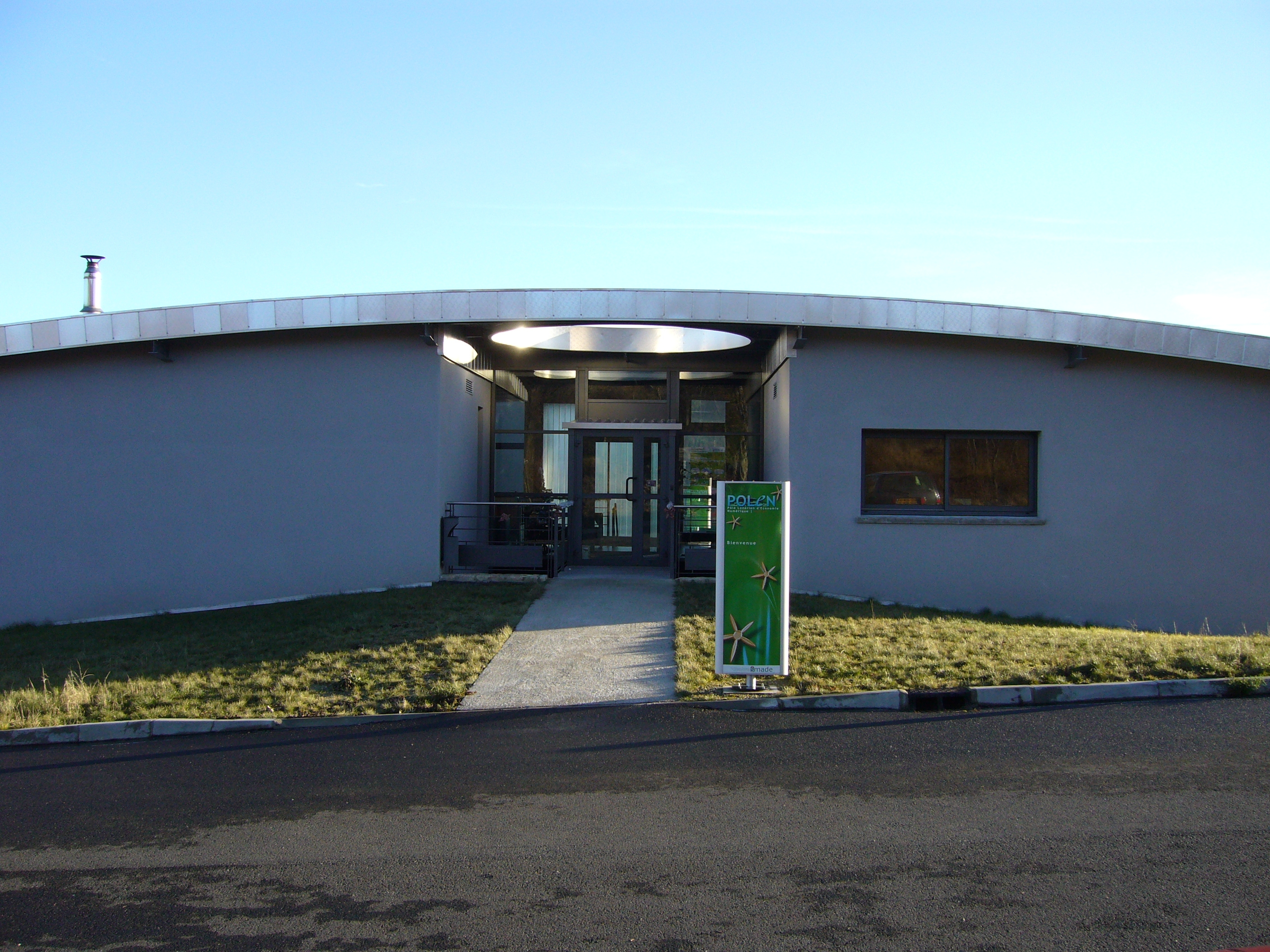 Entrée du Pole lozérien d'Économie Numérique (Mende, Lozère, France)